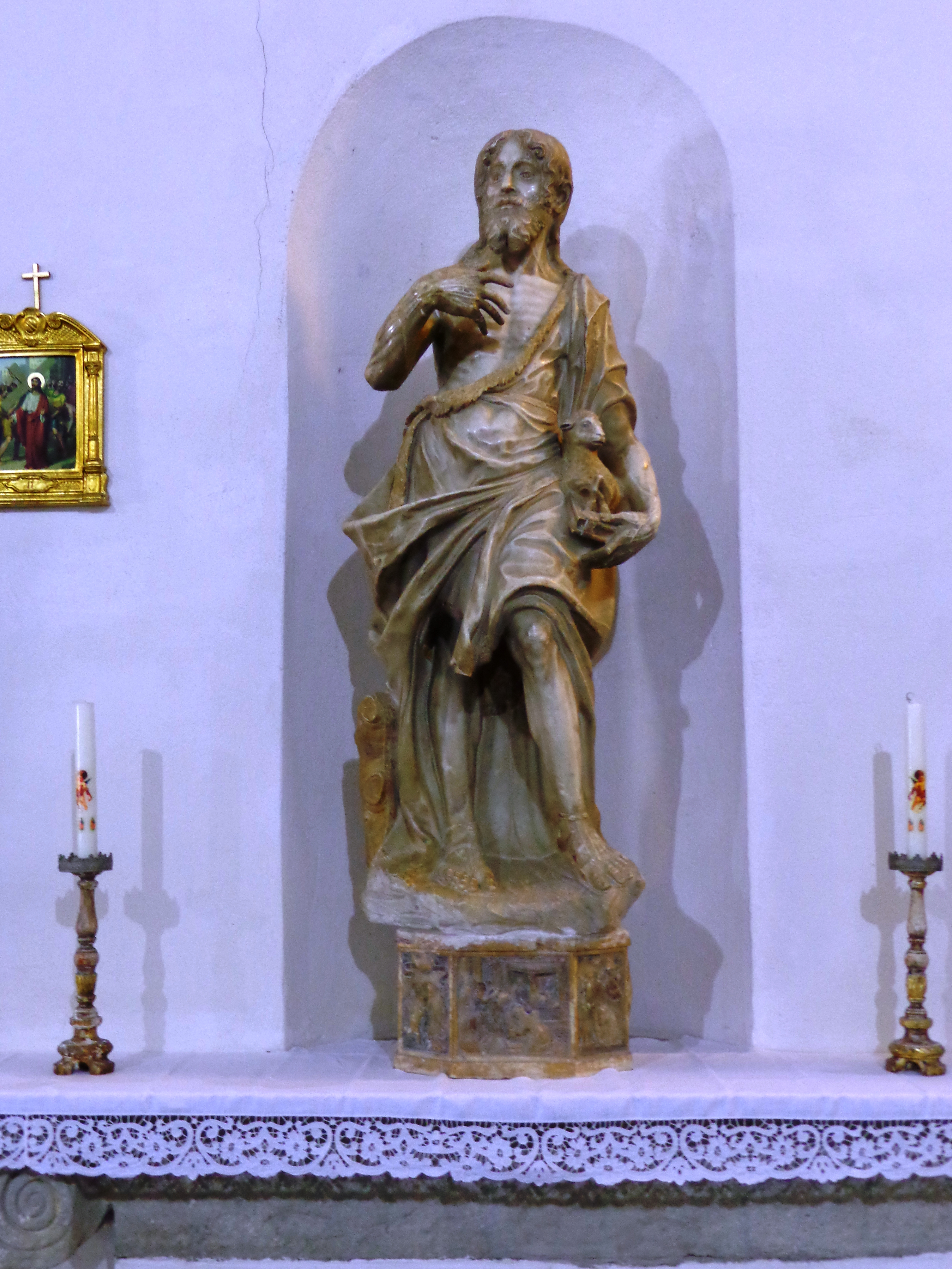 Castroreale_04_2014_09